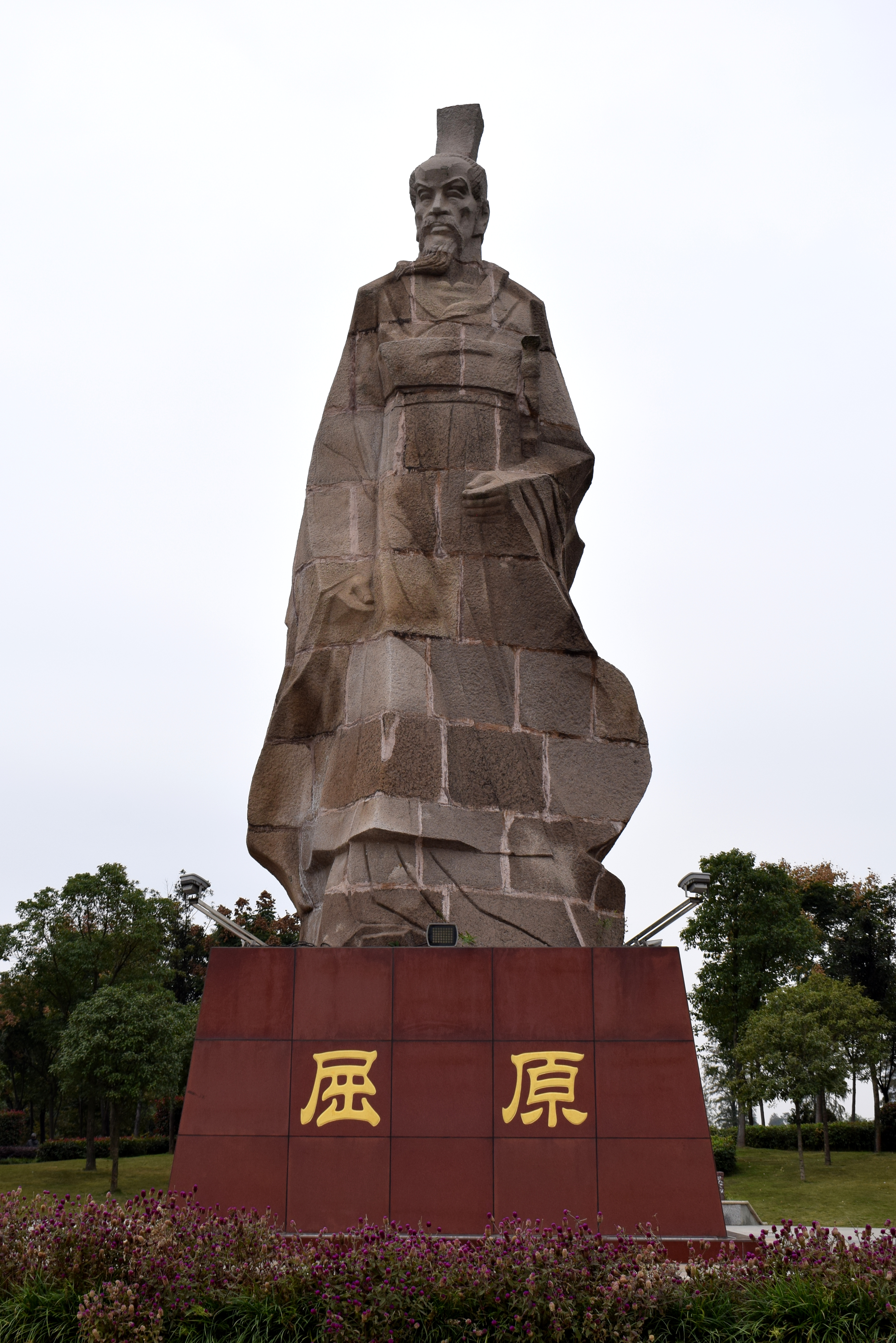 Denkmal für Qu Yuan in Jingzhou